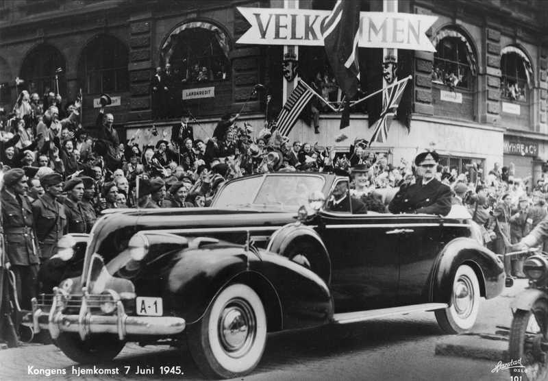 Kongens hjemkomst, bilkortesje, publikum, flagg, forretningsgård. Etter velkomstsermonien hoppet Max Manus inn i kongens bil, her til høyre i forsetet på A-1 sammen med kongens gamle sjåfør. Eskorten bestod av fire jeeper med Lingekarer - to foran og to bak - og en spesiell avdeling fra D.13 AKS 13000 med motorsykler på hver side av kongens bil. En motorsykkel skimtes til høyre i bildet, og det var også en på venstre side. Bilen er en Buick Roadmaster 1939.